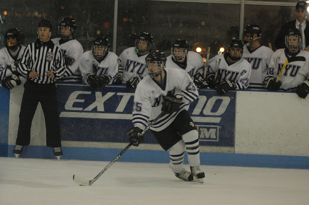 NYU Hockey